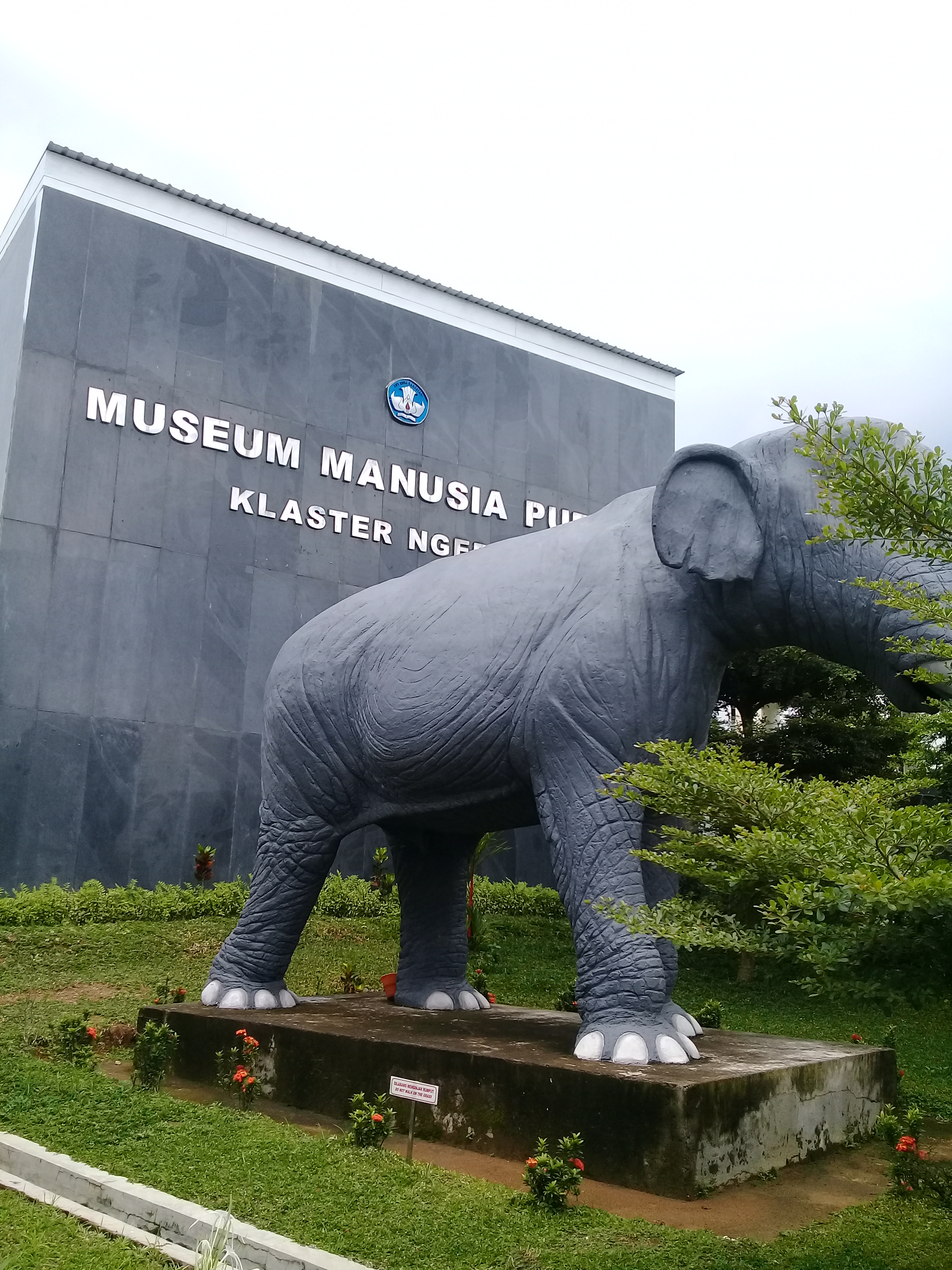 Jawa: Museum Tiyang Purba punika jumeneng wonten ing tlatah Sragen. Sangiran punika nyimpen fosil-fosil uga dados salah satunggaling situs warisan donya UNESCO